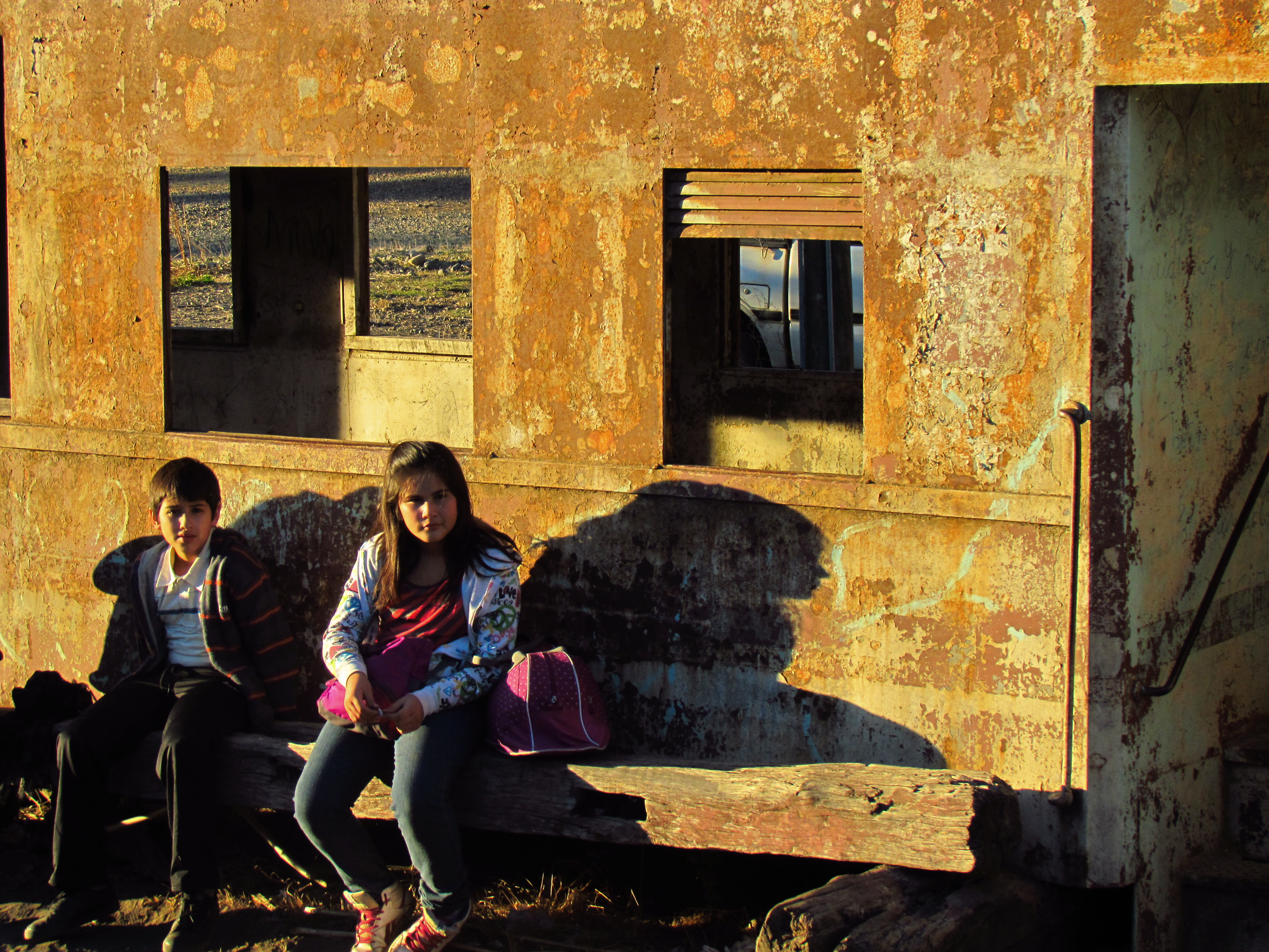 Estación Forel de Ramal Talca-Constitución This is a photo of a national monument in Chile: 2085